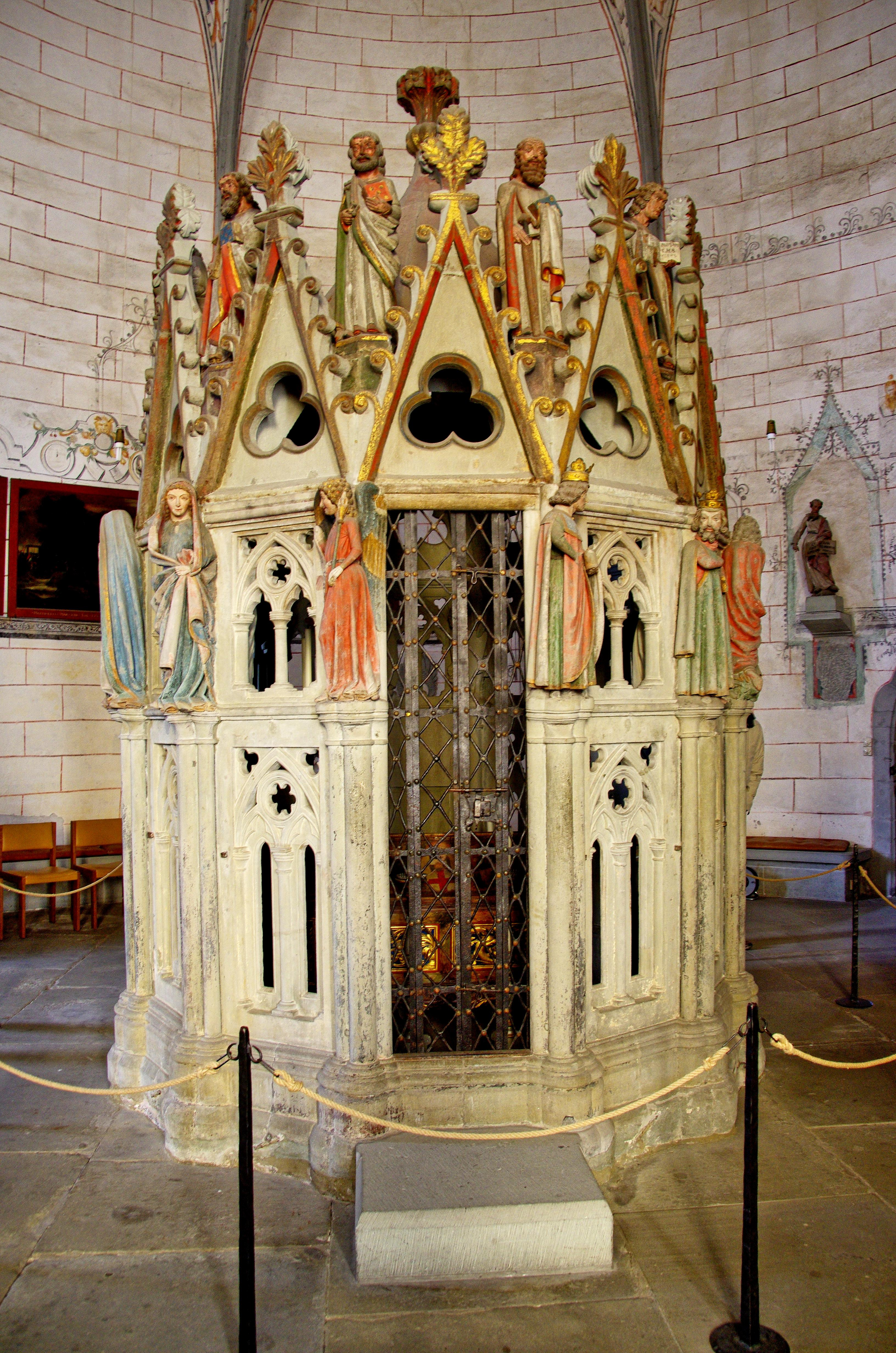 Mauritiusrotunde mit Heiligem Grab